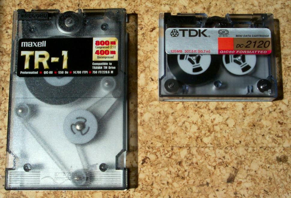 Zwei verschiedene Quarter inch cartridges. Speicherkapazitäten: links 400MB rechts 120MB Bandlängen: links 228m, rechts 94m